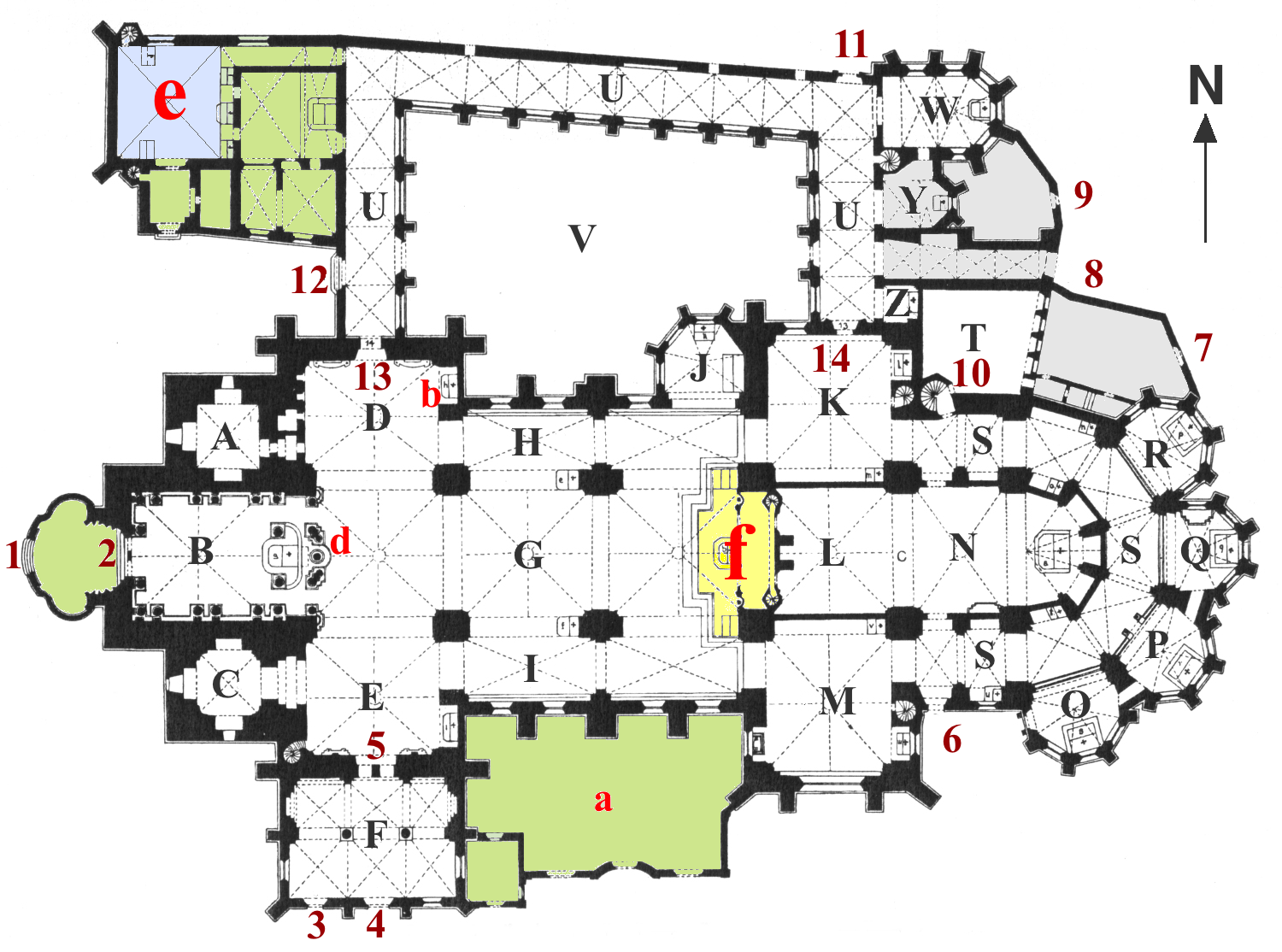 Grundriss des Domes im 18. Jahrhundert. Farblich gekennzeichnet sind bestimmte, heute nicht mehr existierende Bereiche